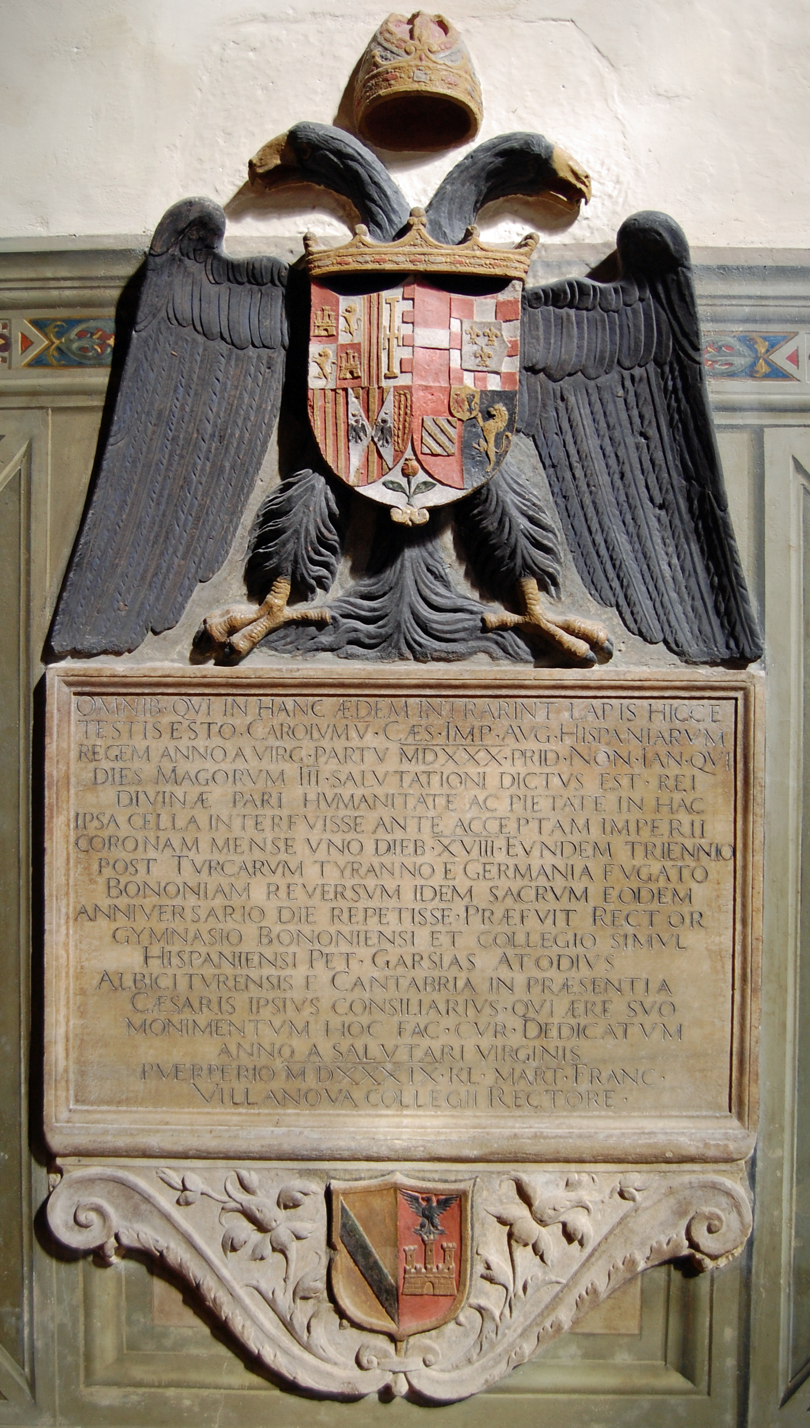 Placa conmemorativa de la estancia de Carlos V en el Colegio de España en Bolonia con motivo de su coronación imperial en 1530. Se encuentra en el interior de la capilla del Colegio, adosada al muro norte.